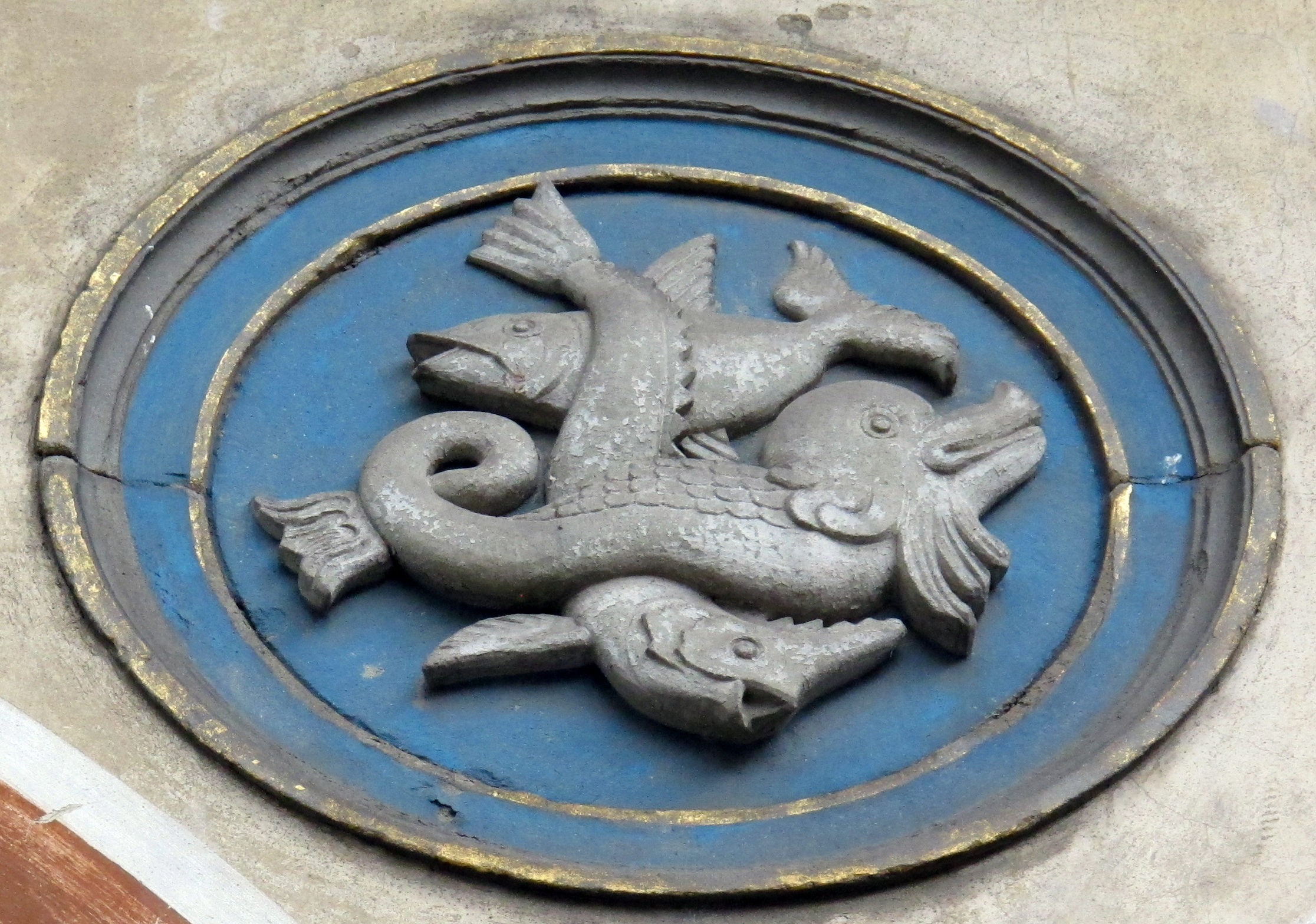 Loggia del pesce in p. dei ciompi, tondo